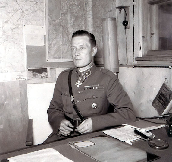 5. Divisioonan komentaja kenraalimajuri Kustaa Tapola.